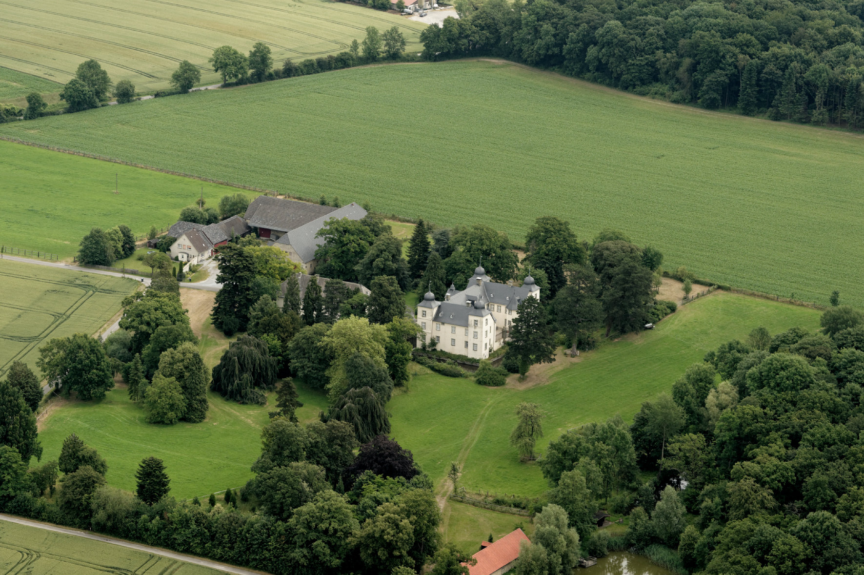 Schloss Eggeringhausen in Anröchte-Mellrich. Fotoflug Sauerland Nord. The making of this document was supported by the Community-Budget of Wikimedia Germany.